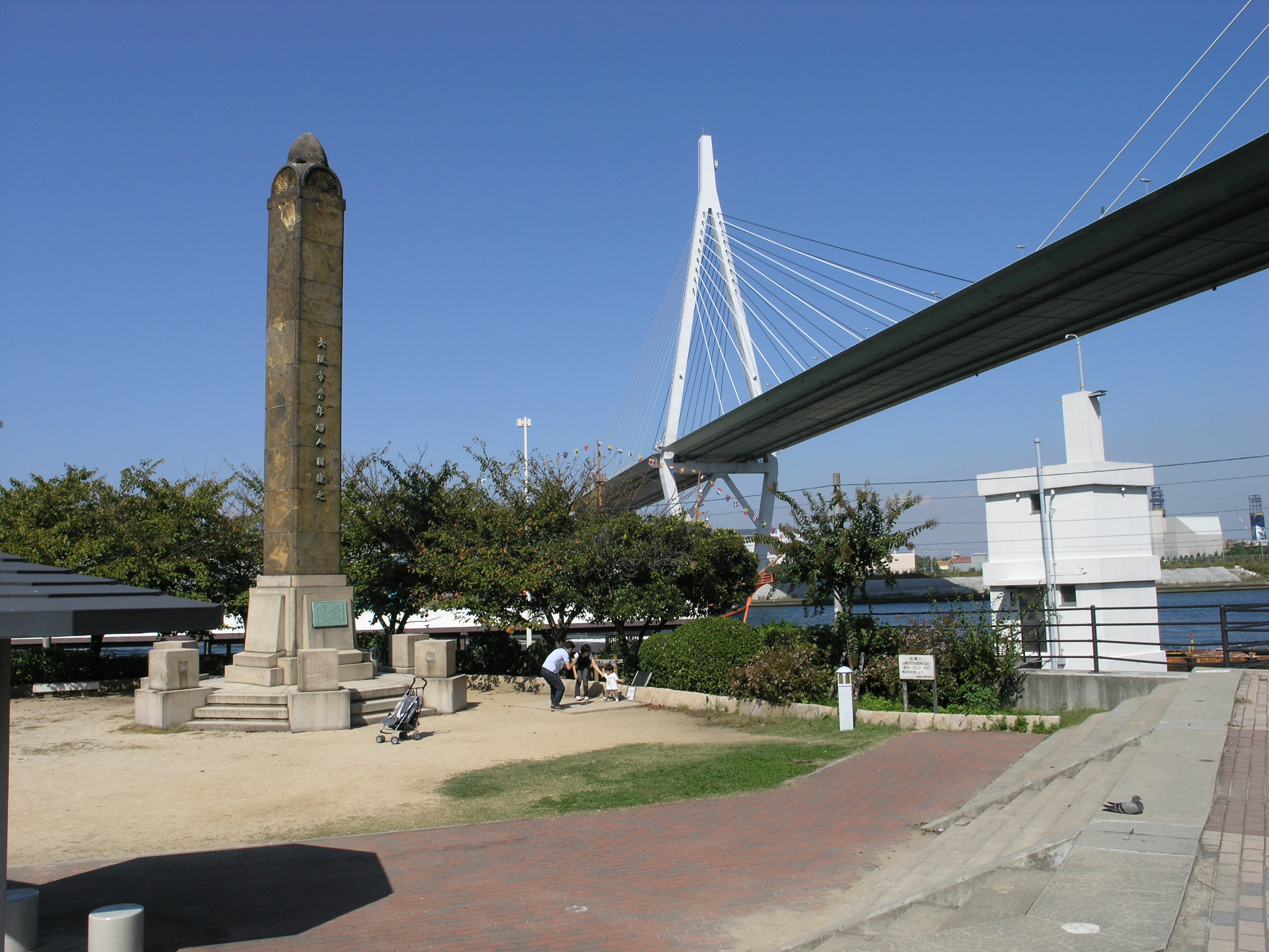 天保山公園（大阪市港区） 2008年10月撮影。 機材：C8080WZ 撮影者：Kansai explorer